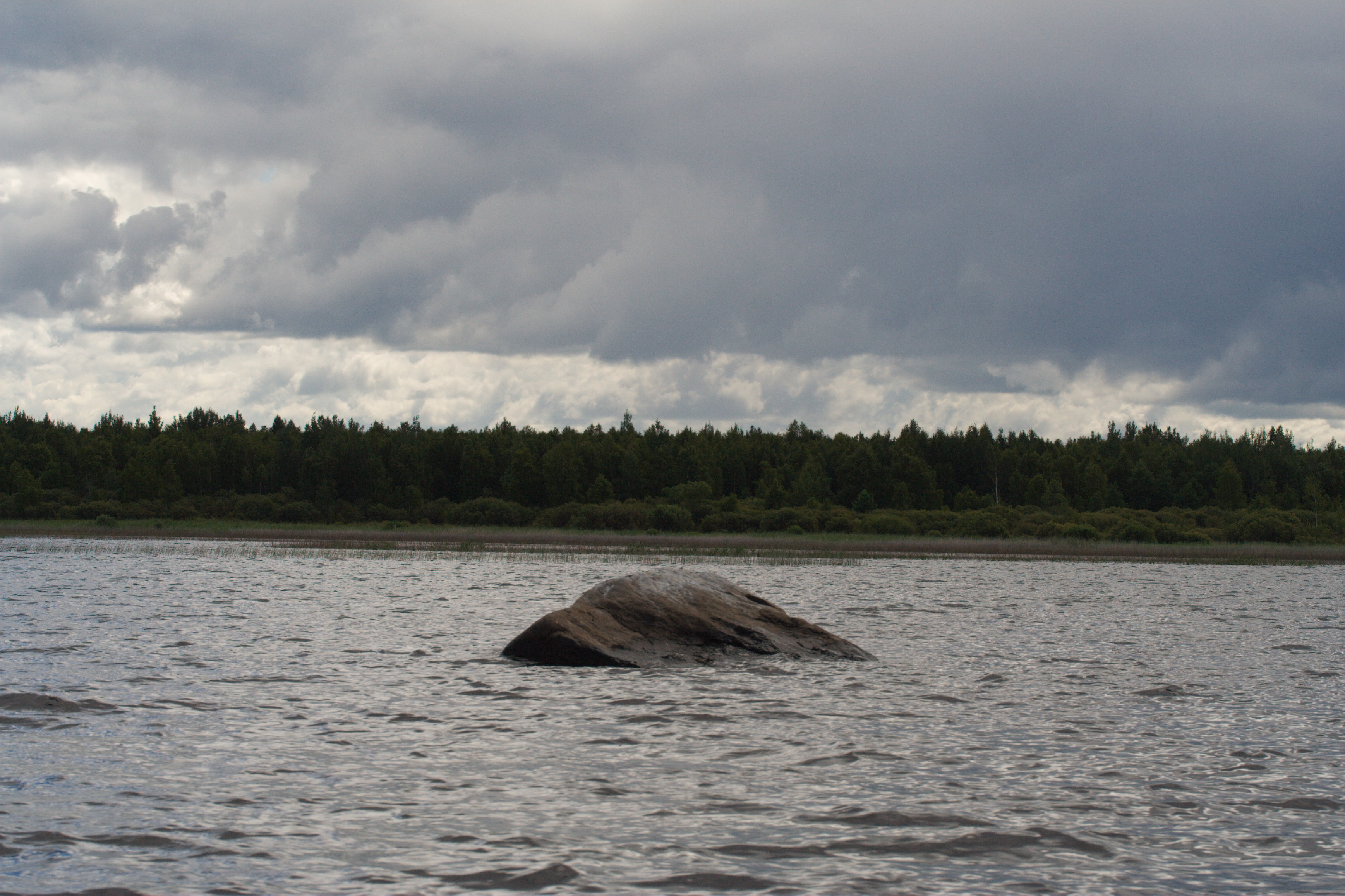 Озеро Цевло Полистовской озерной системы This image is related to the protected area of Russia number 6010009